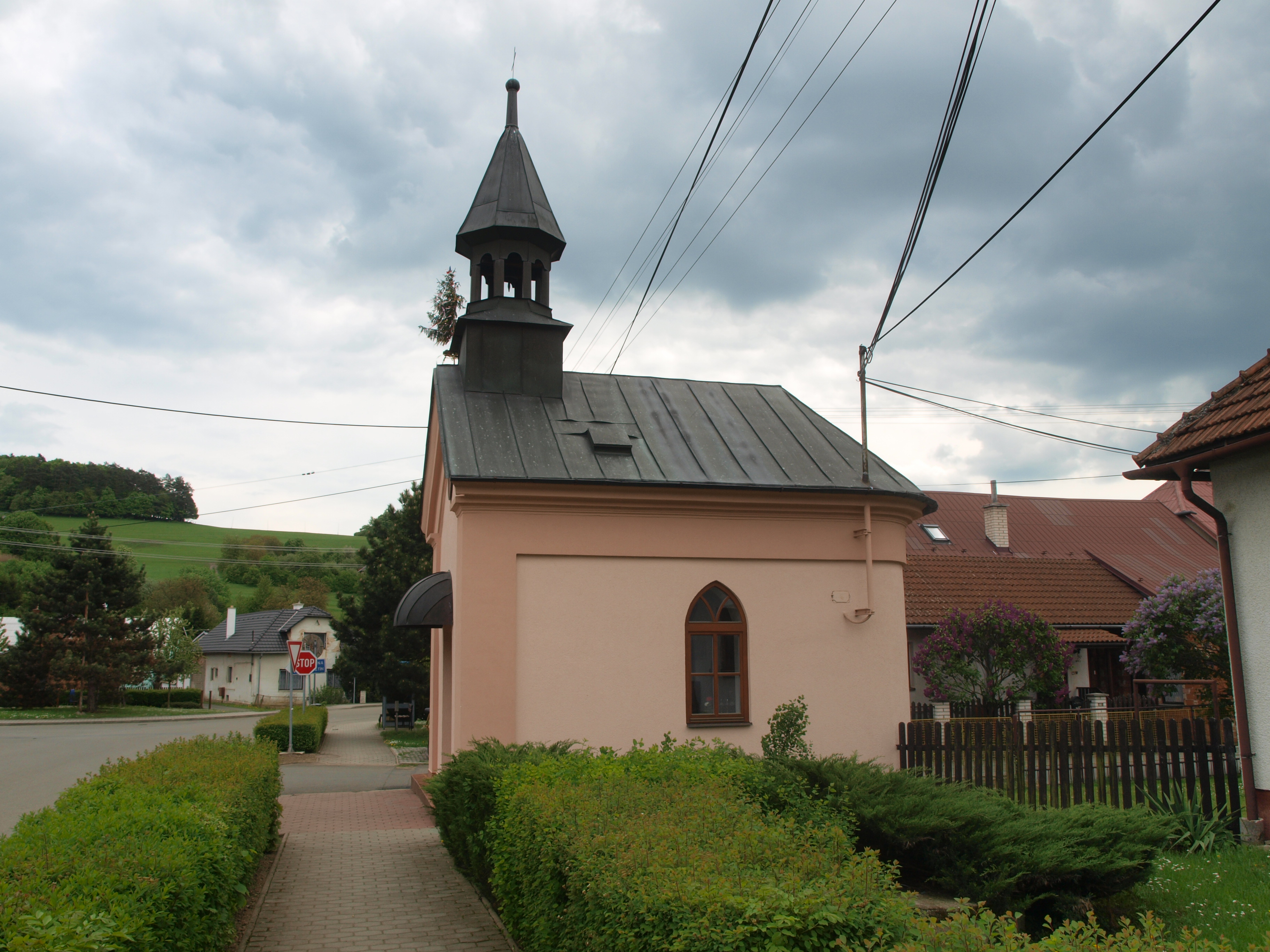 Kaple v obci Neubuz